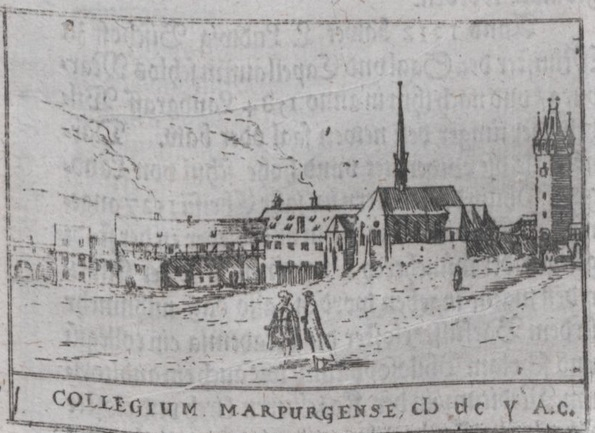 Ansicht des ehemaligen Franziskanerklosters Marburg von Nordosten, 1605